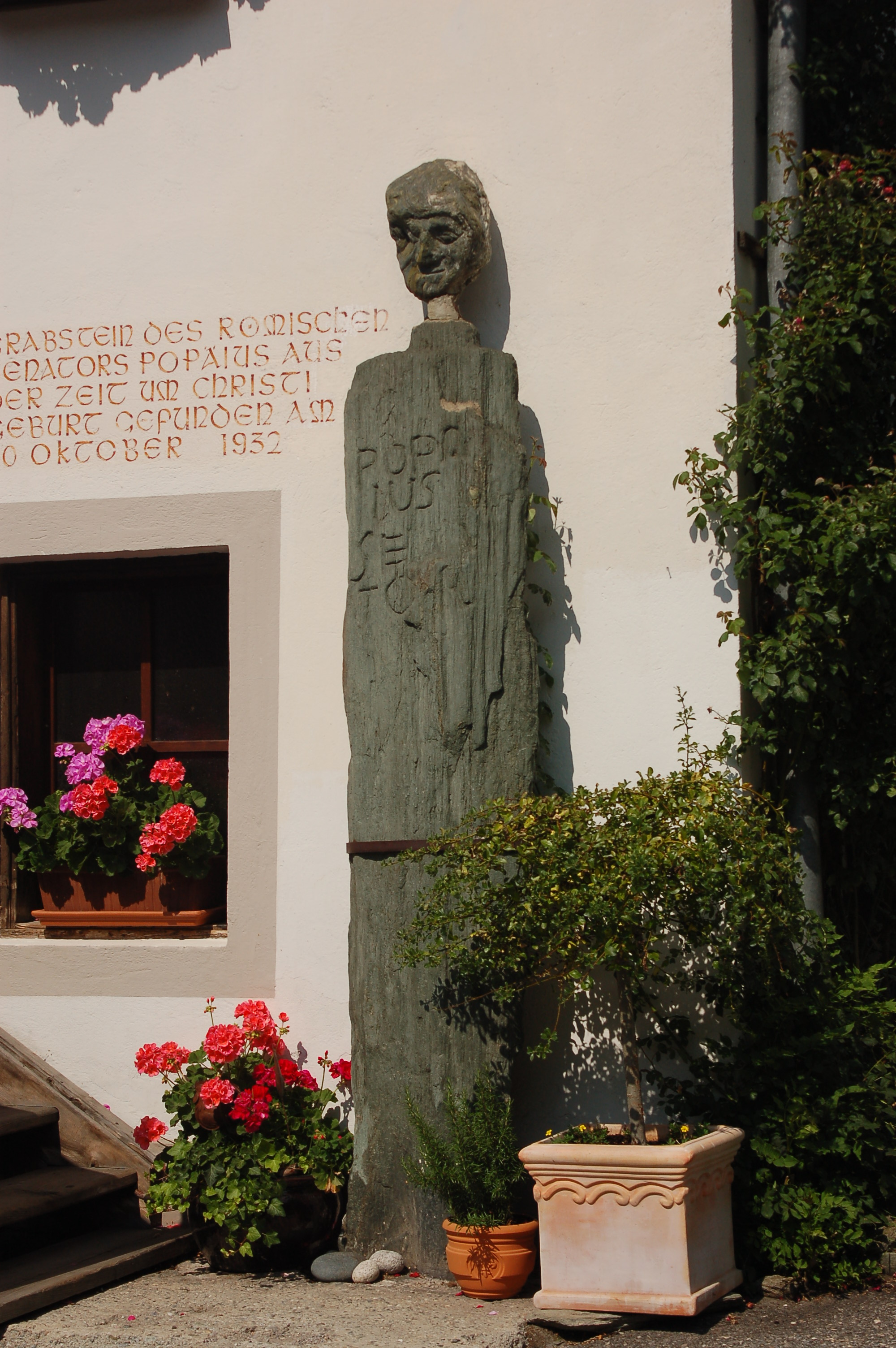 Eine römische Grabstele vor dem Haus Bichl Nr. 5 in der Fraktion Bichl (Gemeinde Matrei in Osttirol) This media shows the remarkable cultural object in the Austrian state of Tyrol listed by the Tyrolean Art Cadastre with the ID 16994. (on tirisMaps, pdf, more images on Commons, Wikidata)